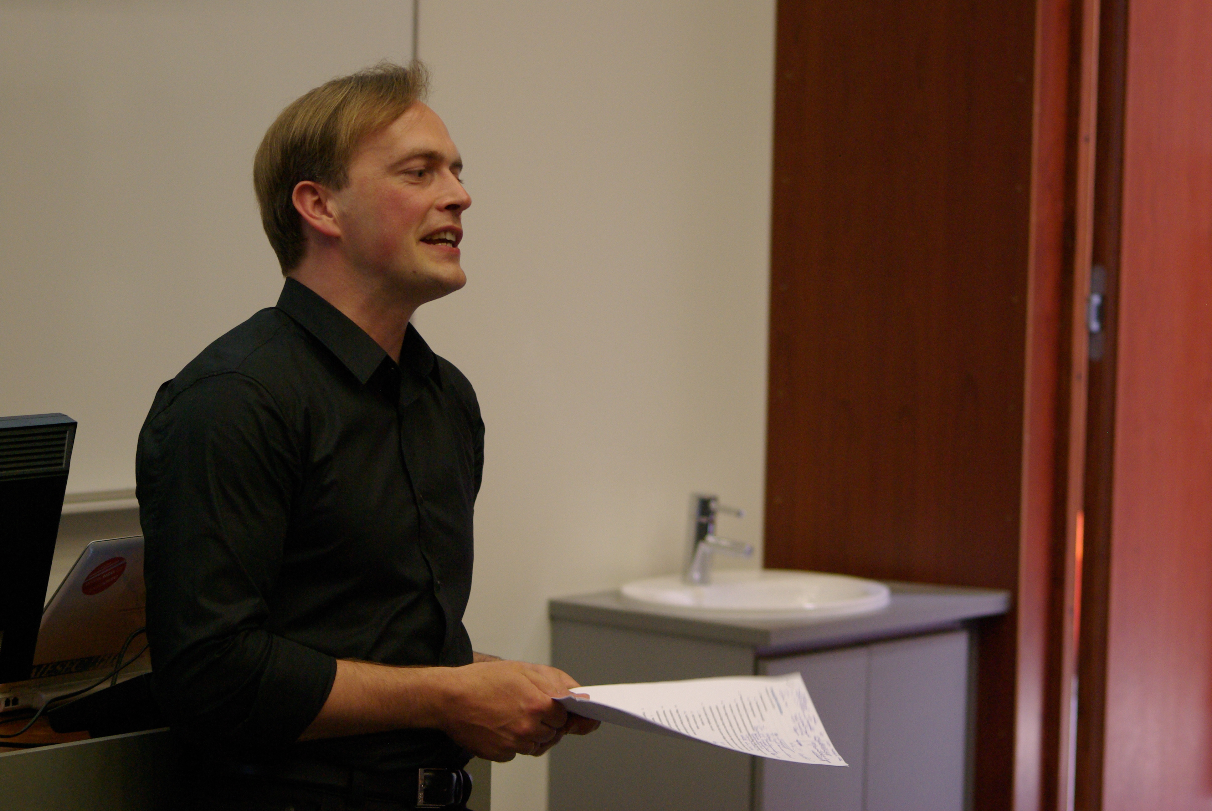 Mart Noorma